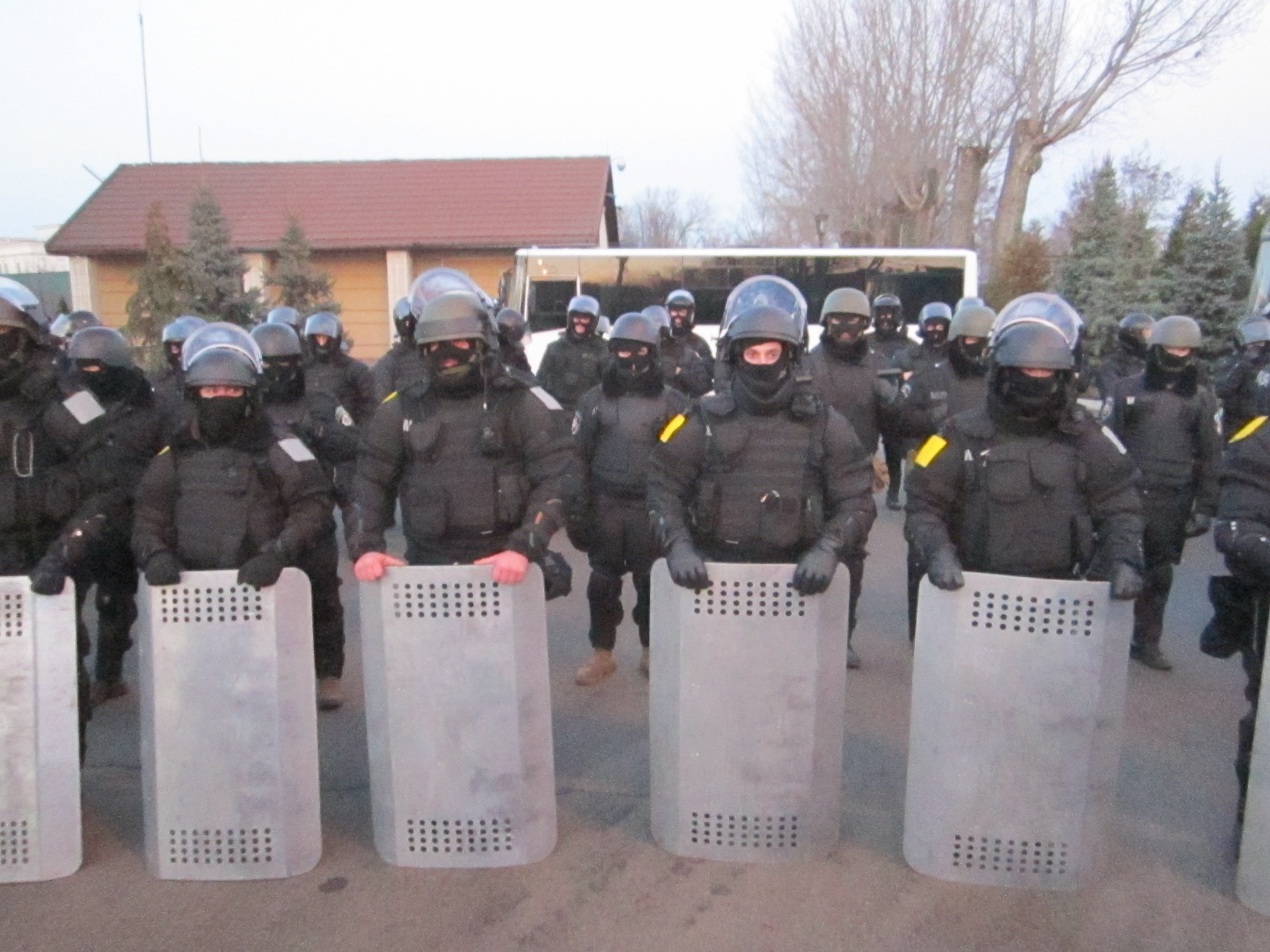 Кордон спецпризначенців перед головним заїздом до резиденції Віктора Януковича в селі Нові Петрівці Вишгородського району Київської області, вулиця Івана Франка, 19.